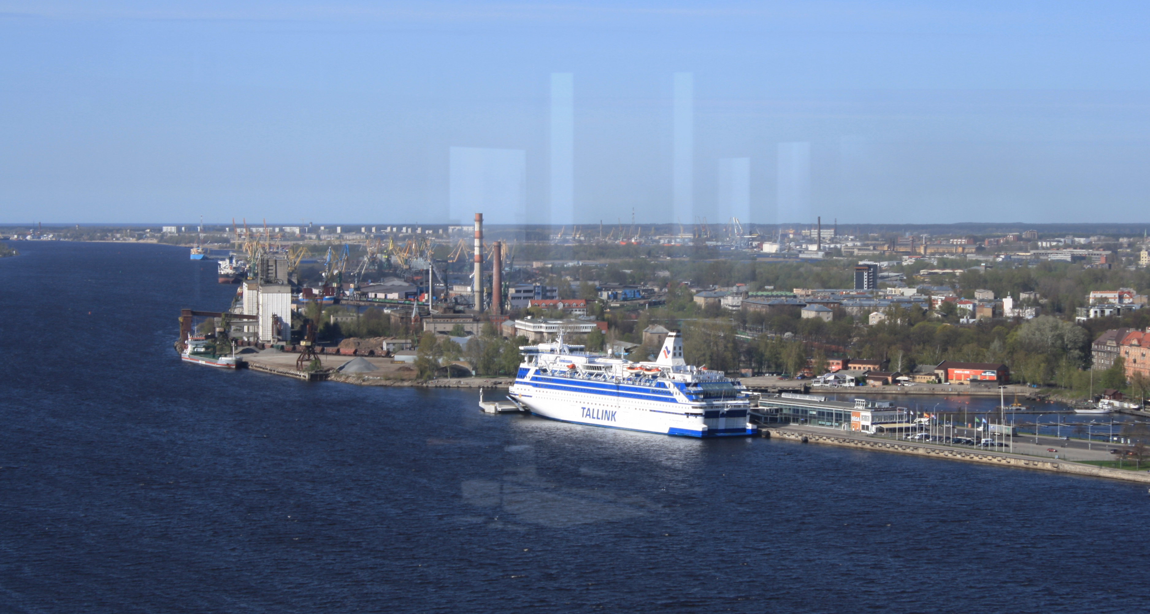 Рига (Латвия) Морской паром и блики на окнах SWEDBANKa